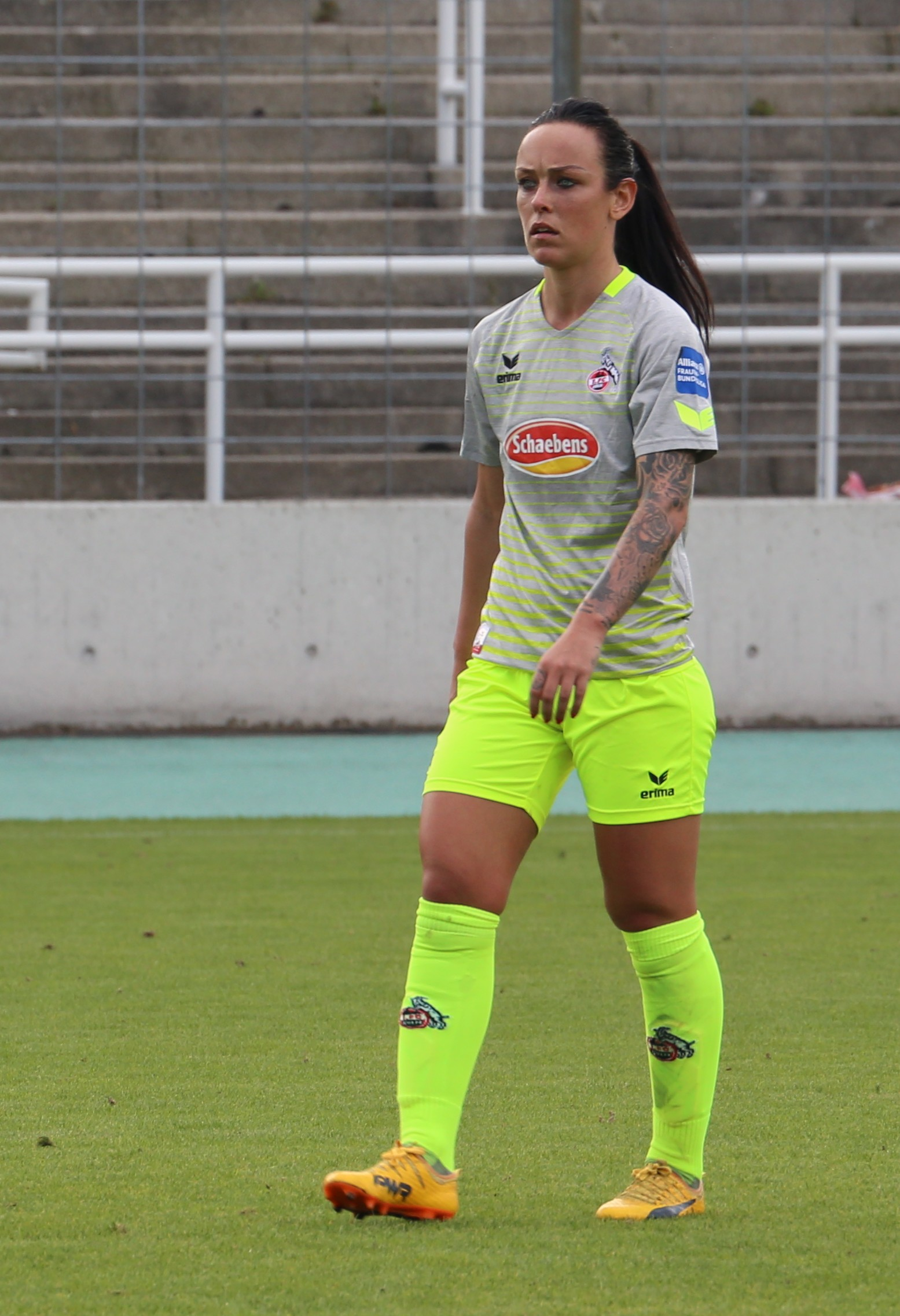 Peggy Nietgen, 1. FC Köln, beim Frauen-Bundesliga-Spiel FC Bayern München gegen 1. FC Köln am 24. September 2017 im Stadion an der Grünwalder Straße (Ergebnis war 2:0)